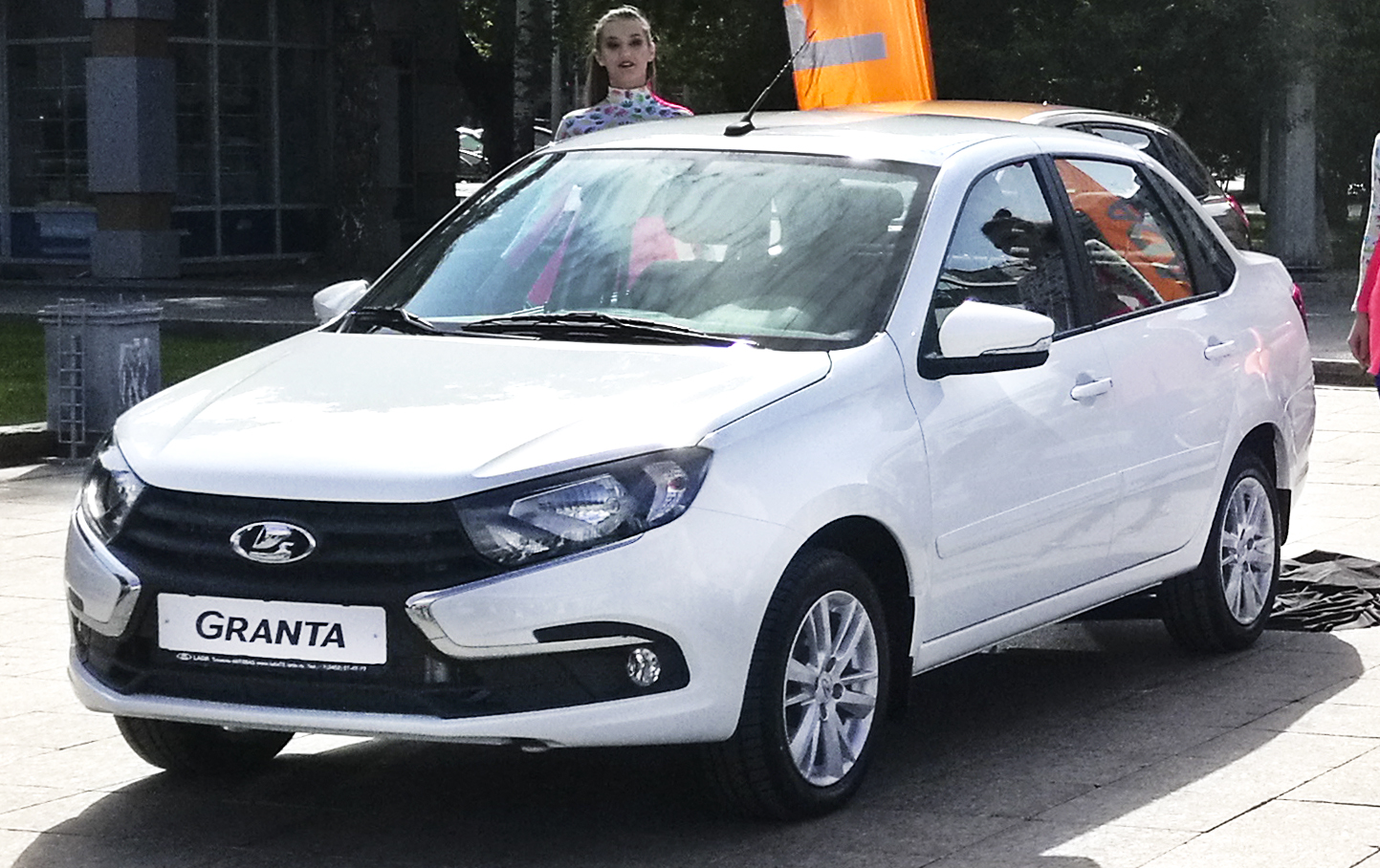 Prezentado de nova versio de Lada Granta. Cvetnoj bulvardo, Tjumeno, Rusio.